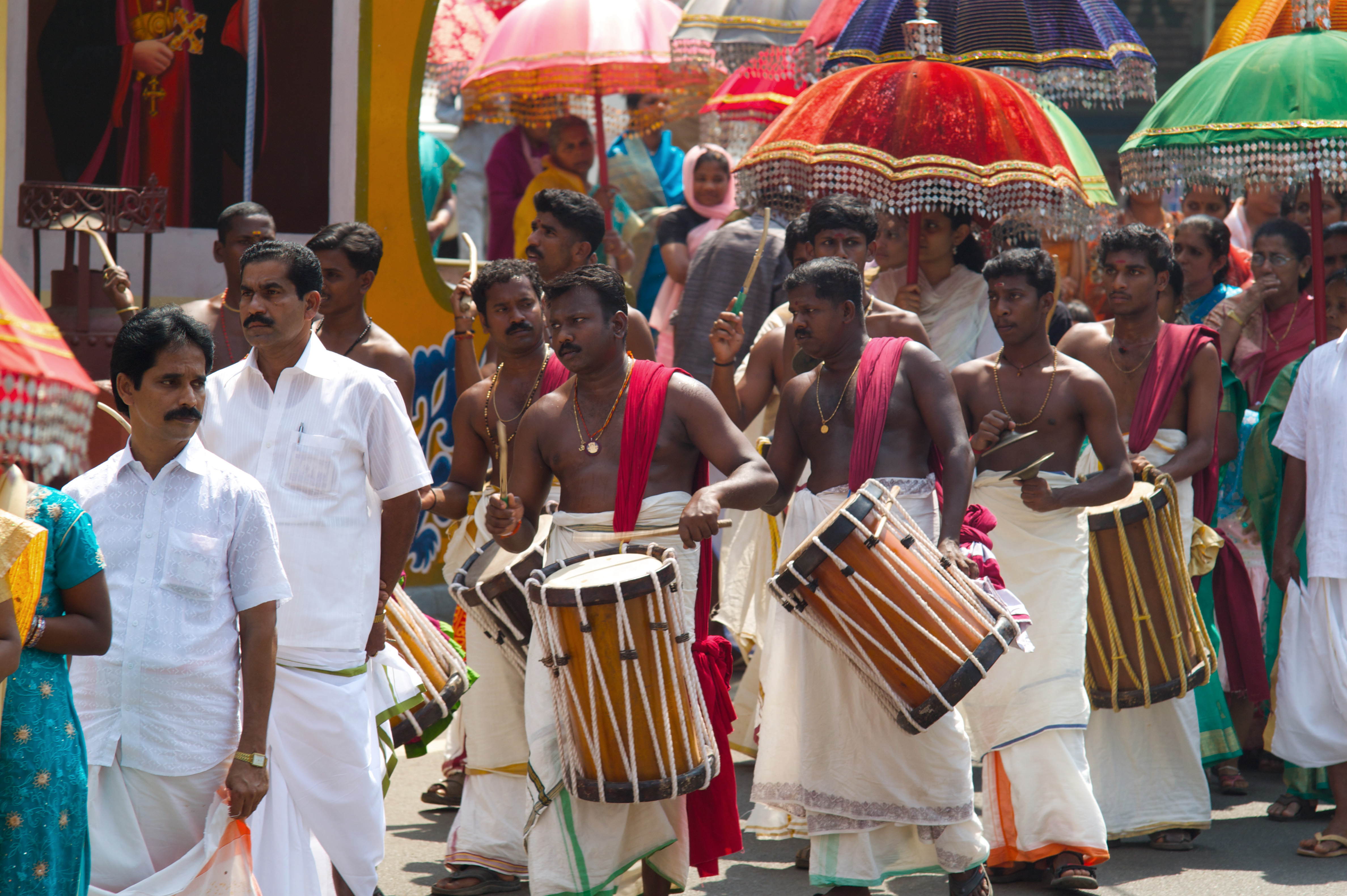 Piravom Valiya Pally pradakshinam